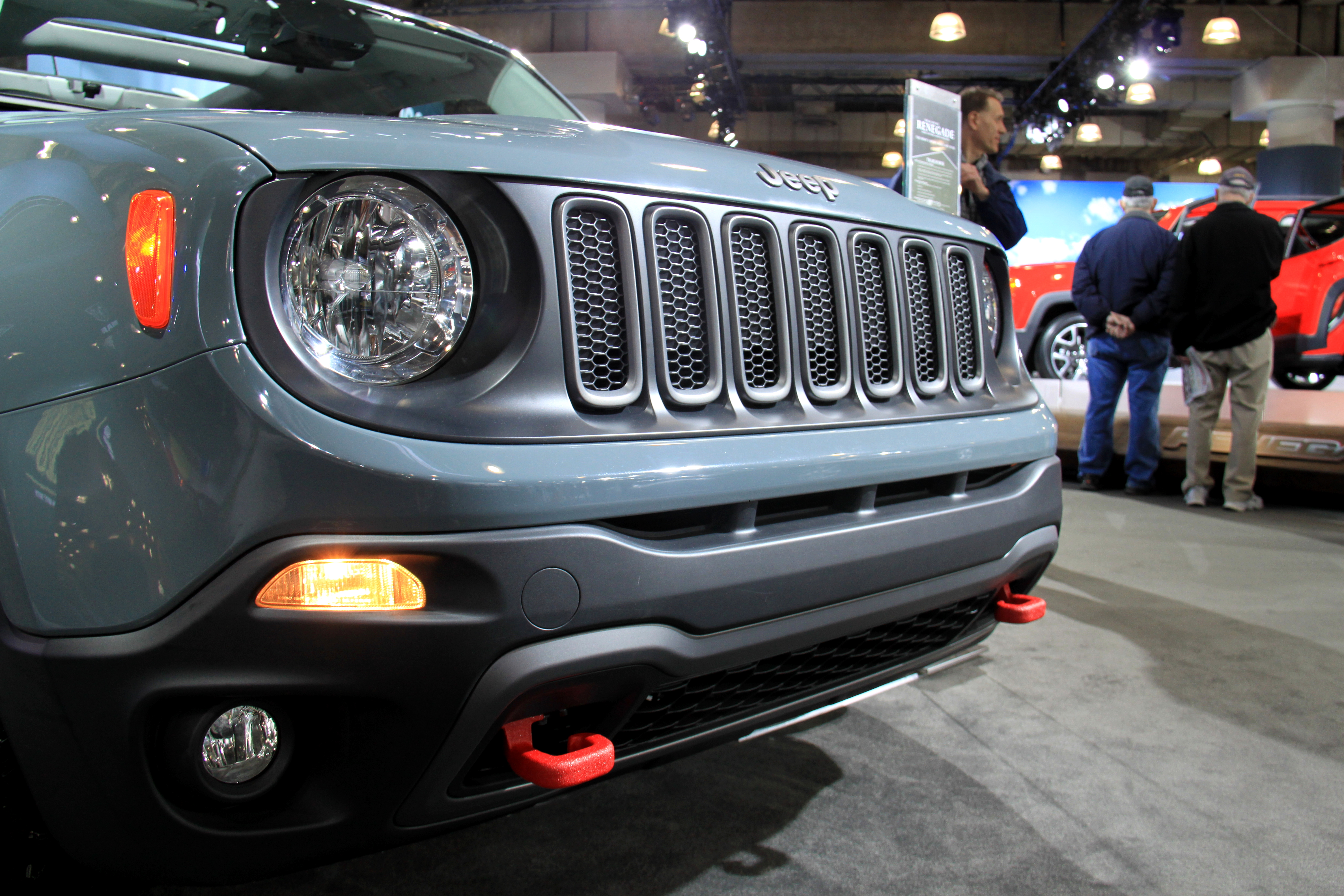 JEEP Renegade produzione: MELFI - ITALIA piattaforma: Fiat Punto / 500L esposizione: Salone Internazionale dell'automobile di New York 2014